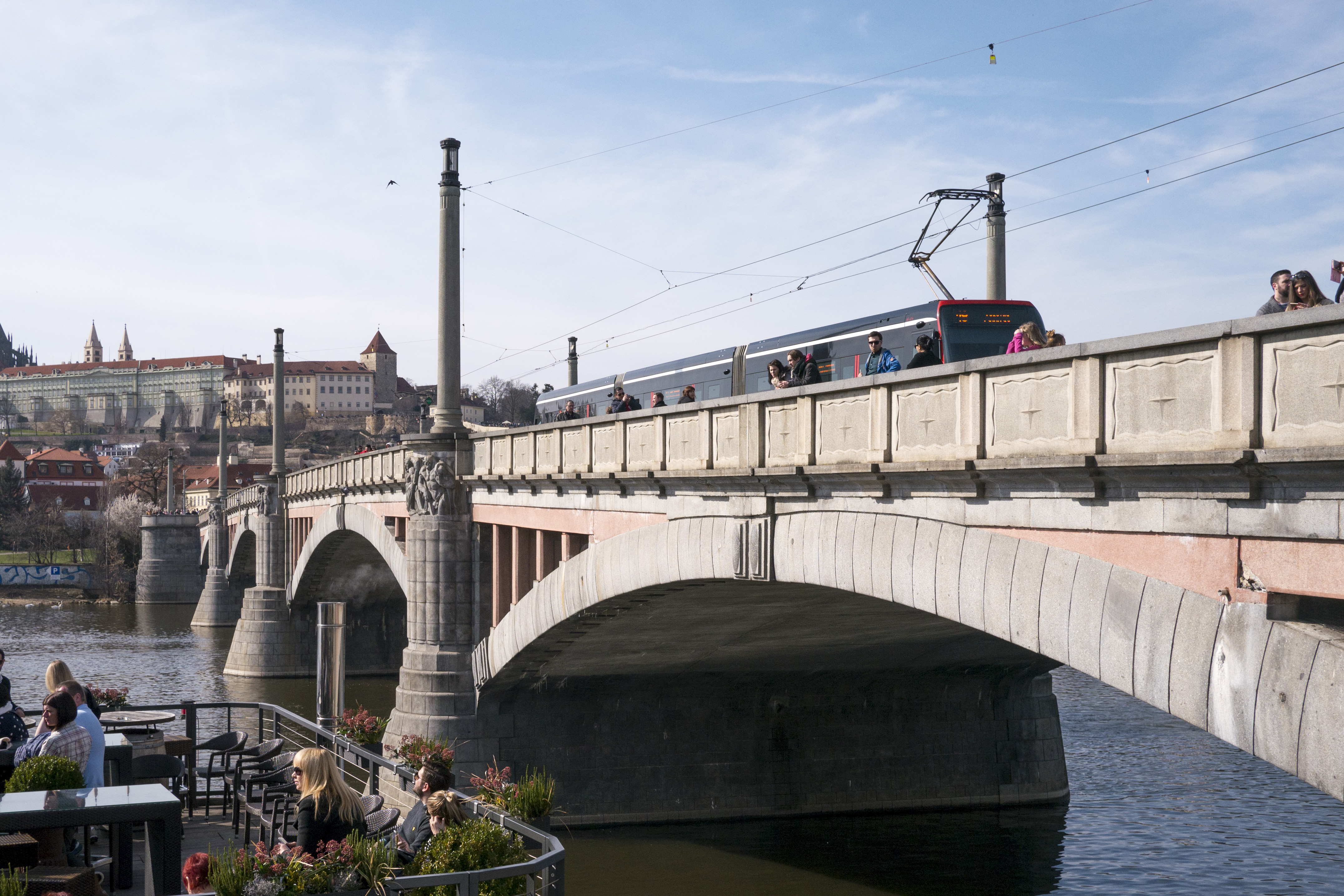 Prag Manes-Brücke Kubismus